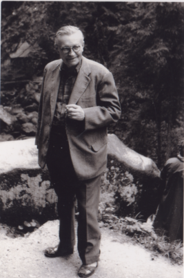 Photo de famille